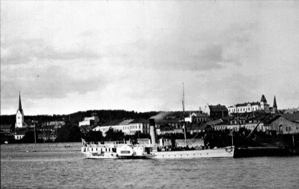 DS Skibladner, der unter Denkmalschutz stehende älteste noch in Betrieb befindliche Raddampfer der Welt auf einer historischen Aufnahme. Die Aufnahme entstand 1900 im Hafen von Hamar am Mjøsasee (Norwegen)